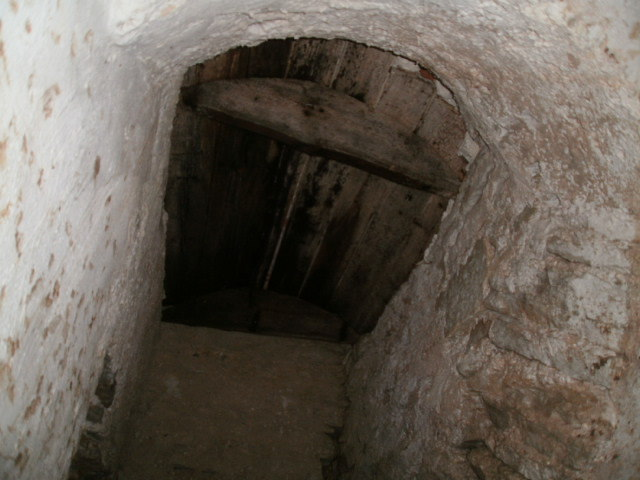 Keldrikorruse lagi I põhjapoolse ruumi eendis. Avaus on kaetud laudadest kaanega.